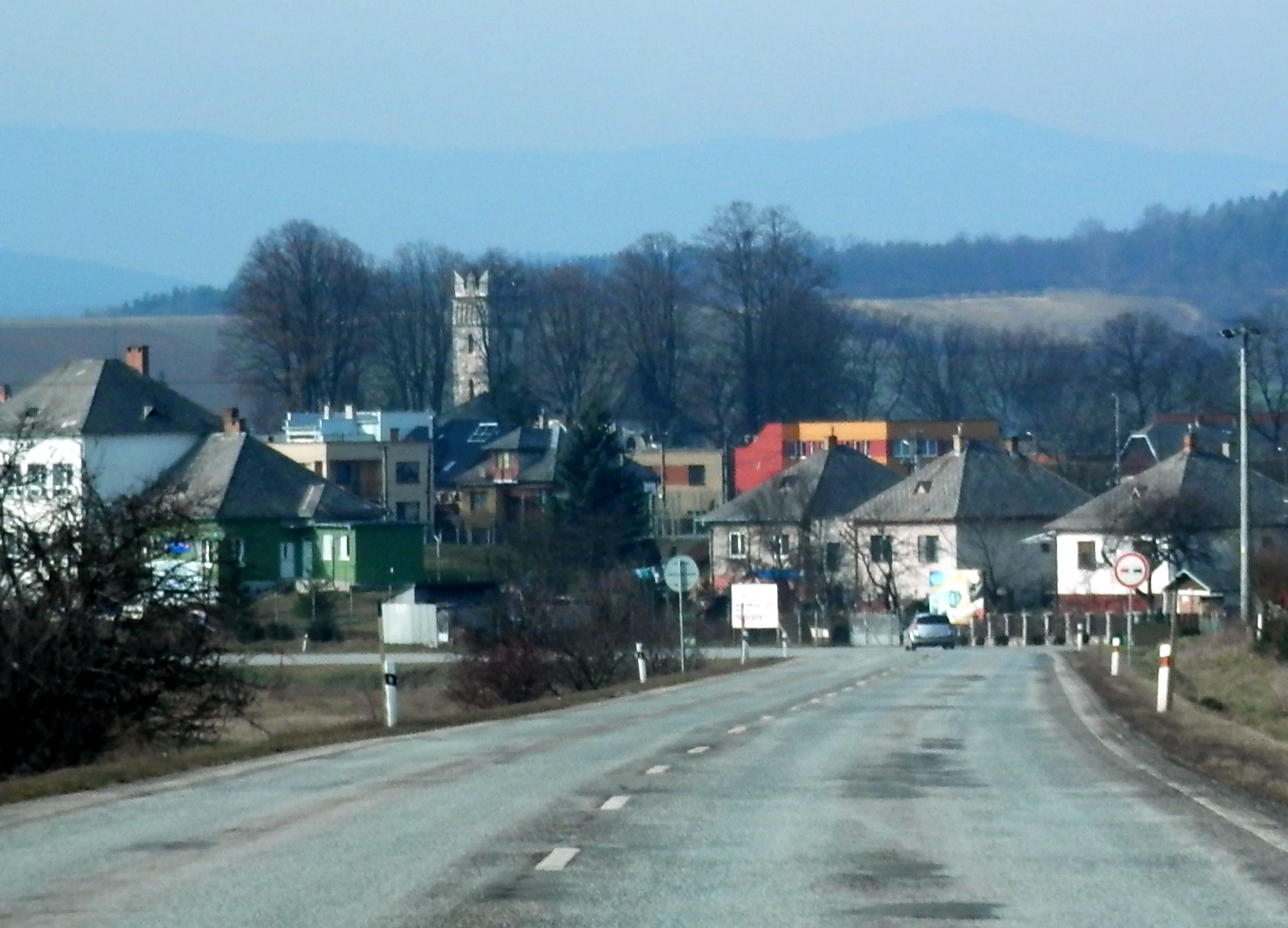 Obec Svinia, okres Prešov.